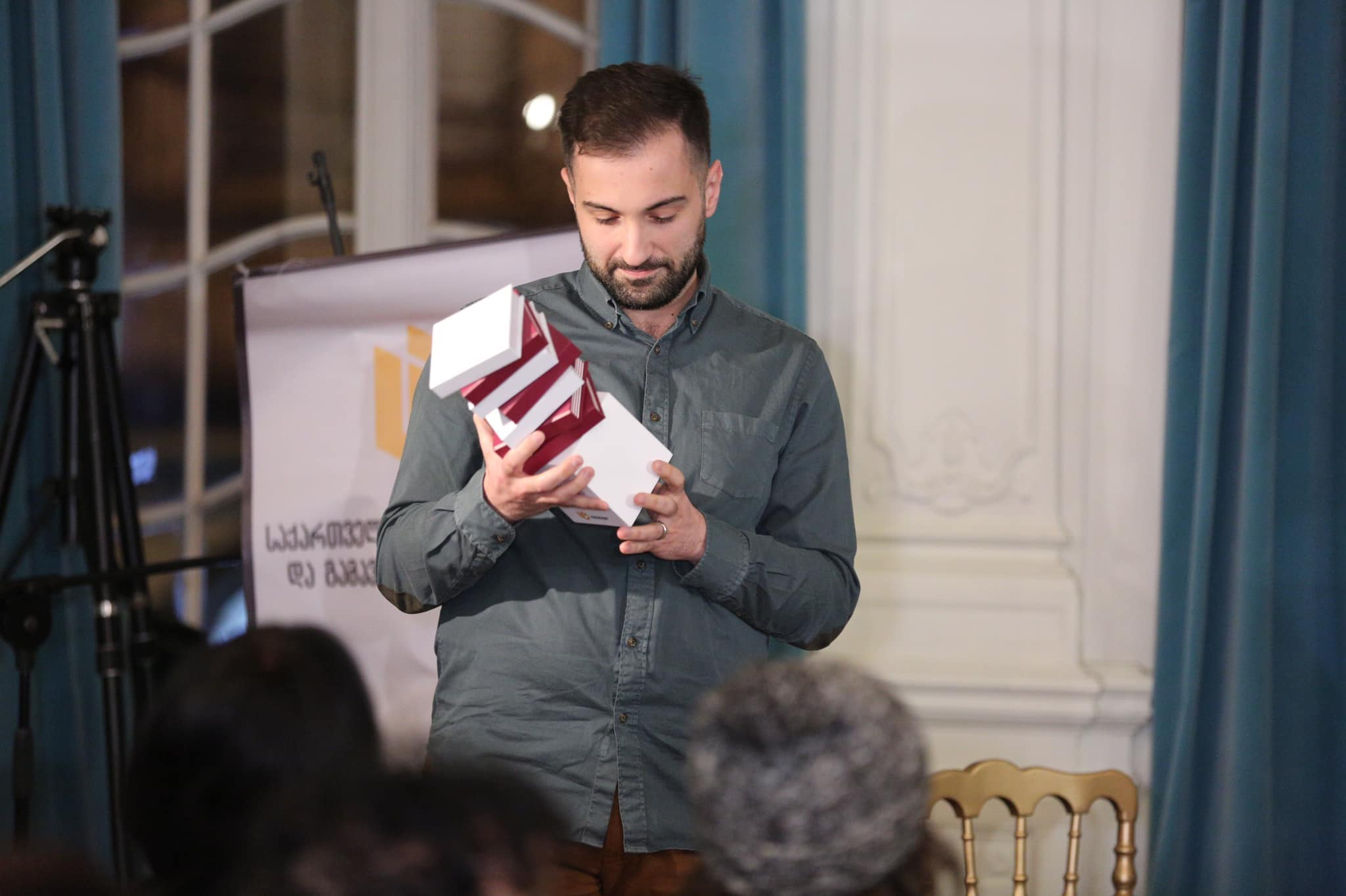 ალექსანდრე ლორთქიფანიძე "წიგნის ქომაგი 2020" ჯილდოსთან ერთად